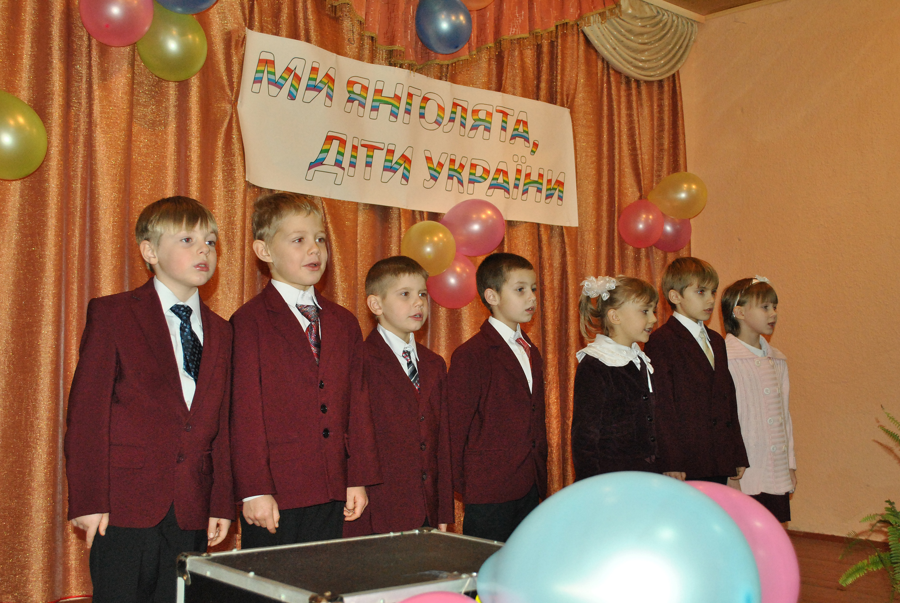 Учні Тернопільської спеціалізованої школи № 17 імені Володимира Вихруща.